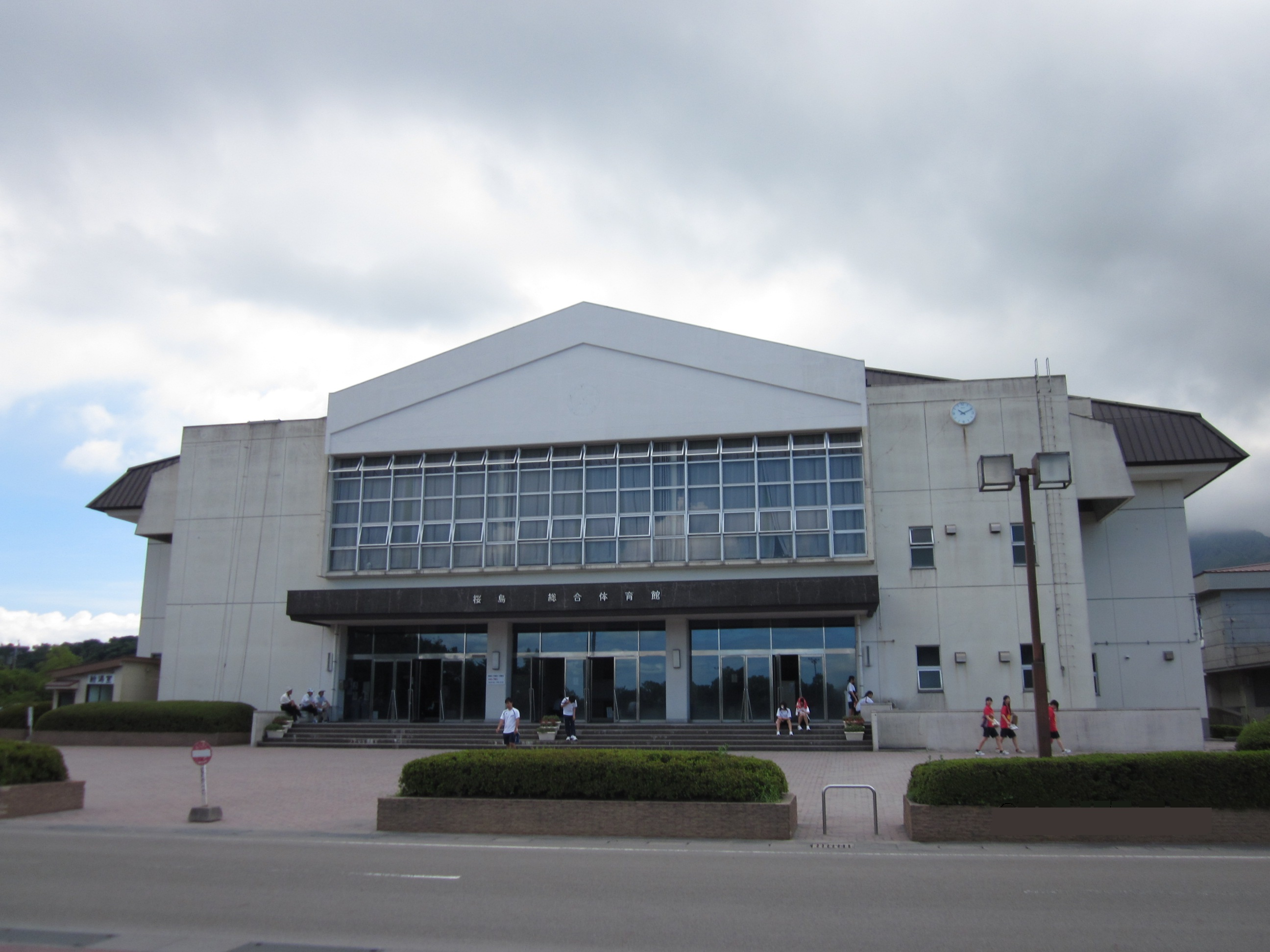 桜島総合体育館の外観。（一部加工済み）